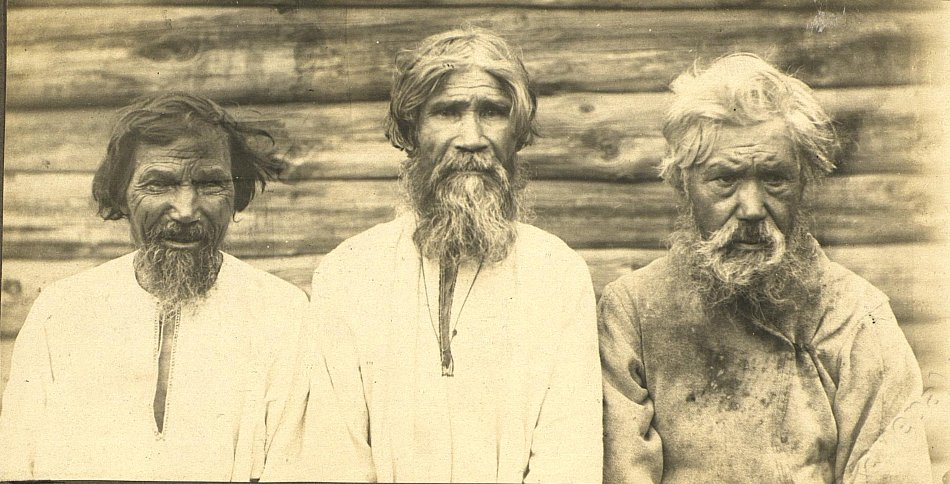 Группа пожилых мужчин. Чуваши верховые. Казанская губ. Начало XX века.